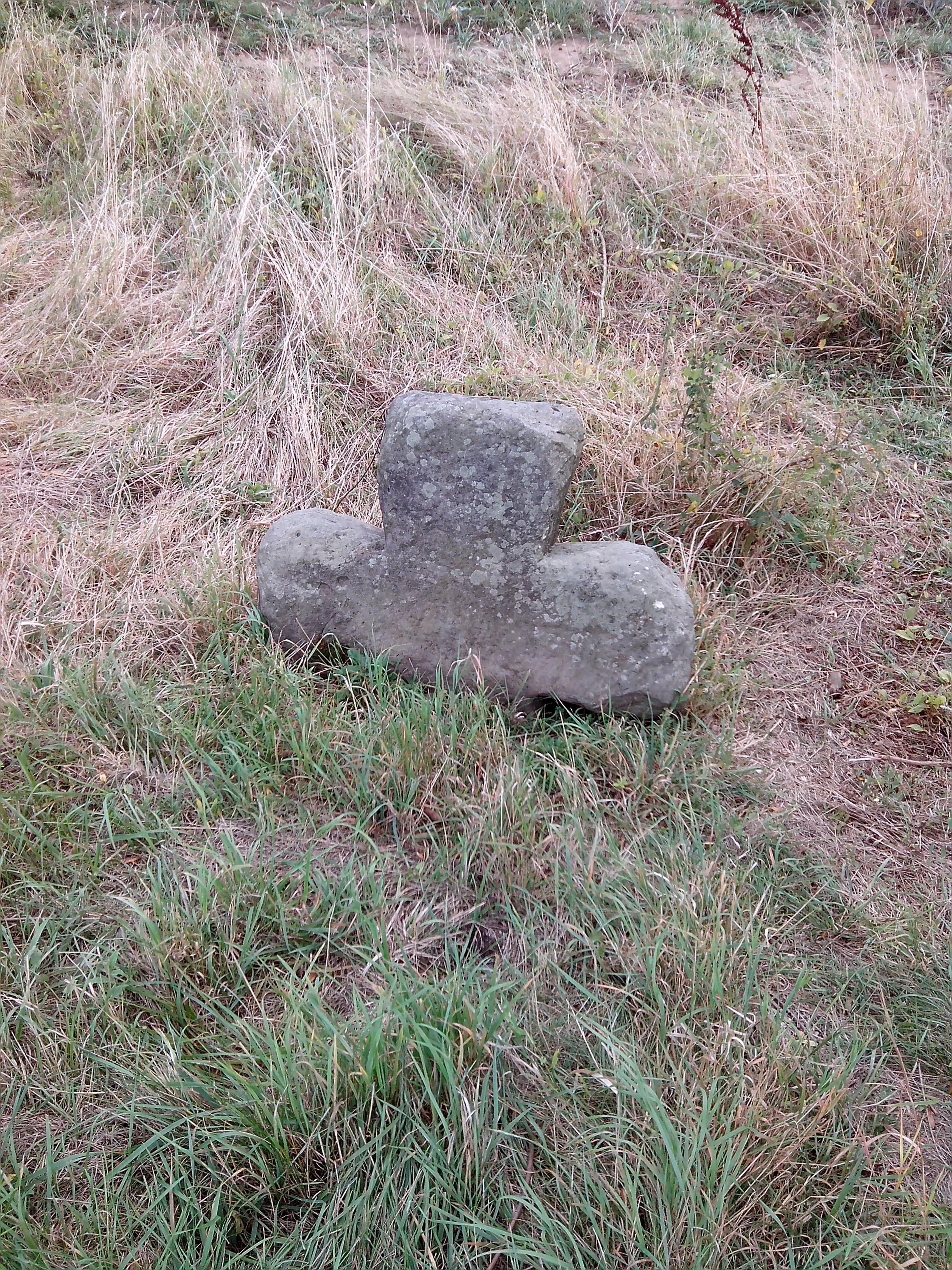 Doubravice - smírčí kříž